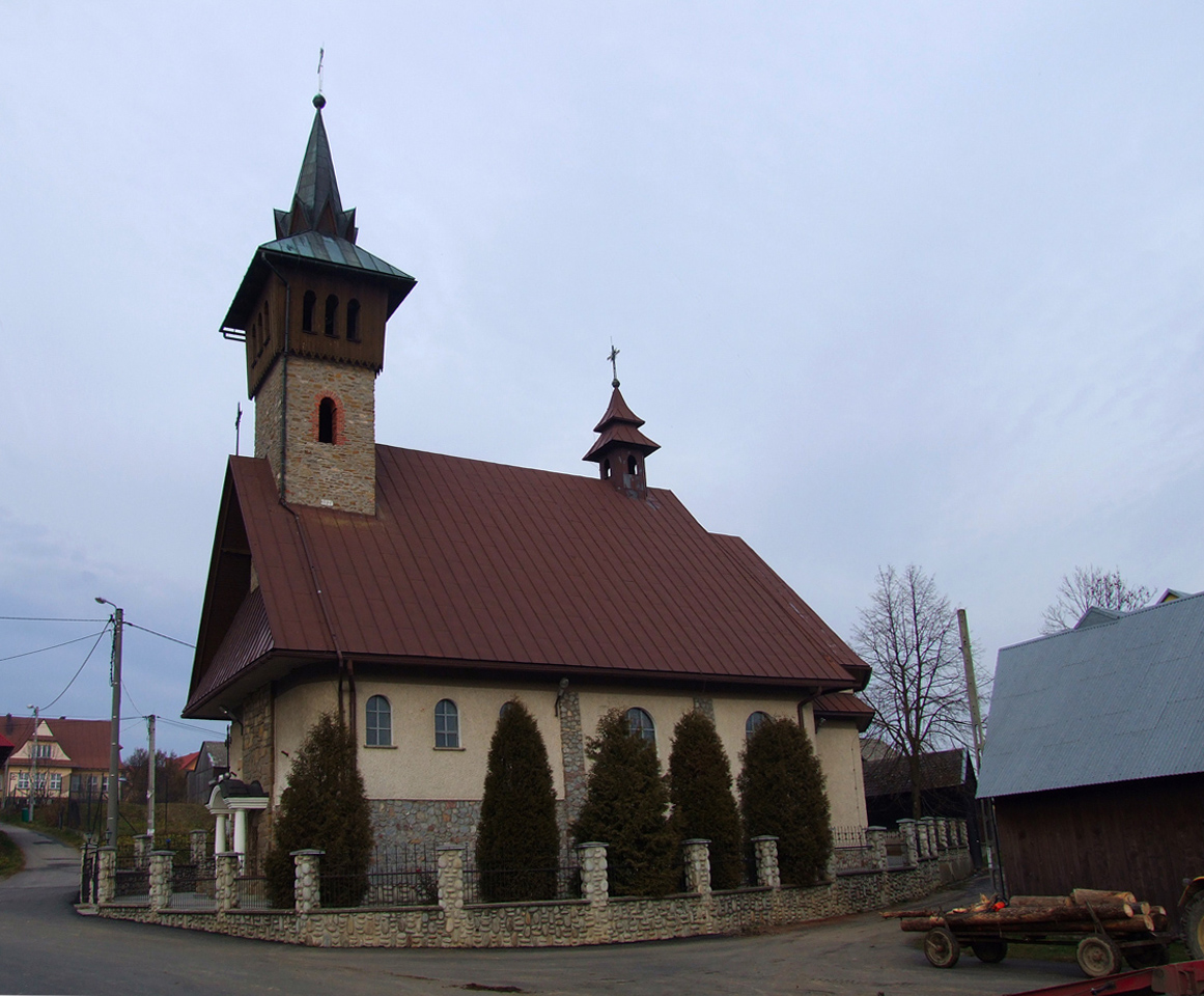 Kościół parafialny p.w. św. Jana Chrzciciela w Dursztynie